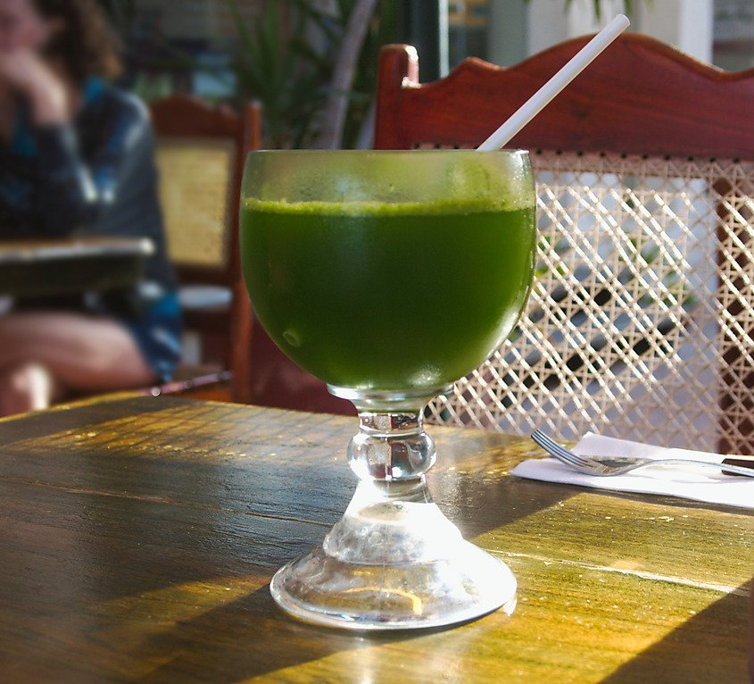 Agua de chaya at cafe Amigos on Av. Hidalgo, Isla Mujeres.